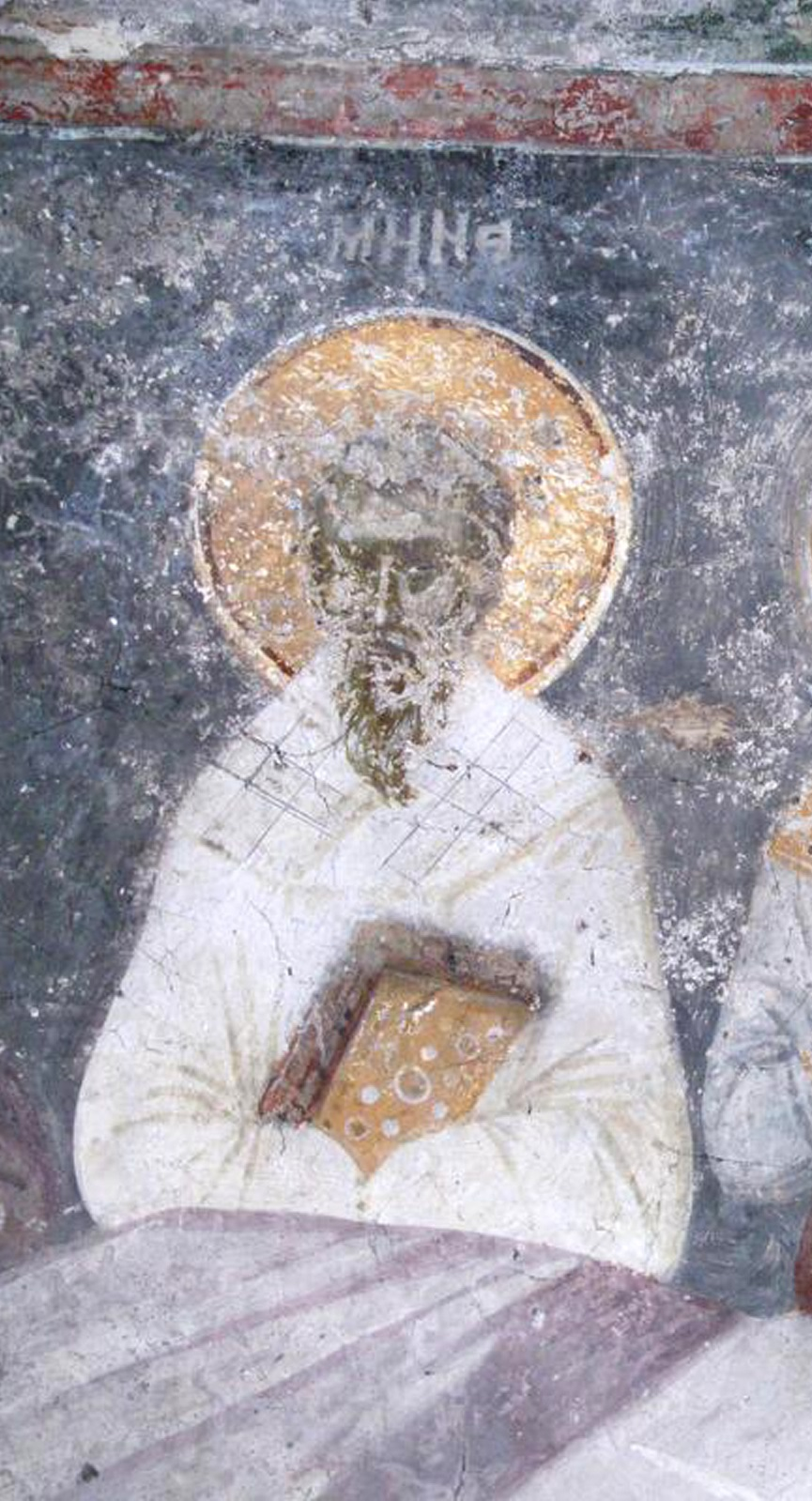 Мина патриарх Константинопольский и неизвестные святые. Северный рукав, северная стена; Балканы. Сербия. Грачаница; XIV в.; местонахождение: Сербия. Косово. Монастырь Грачаница. Неф